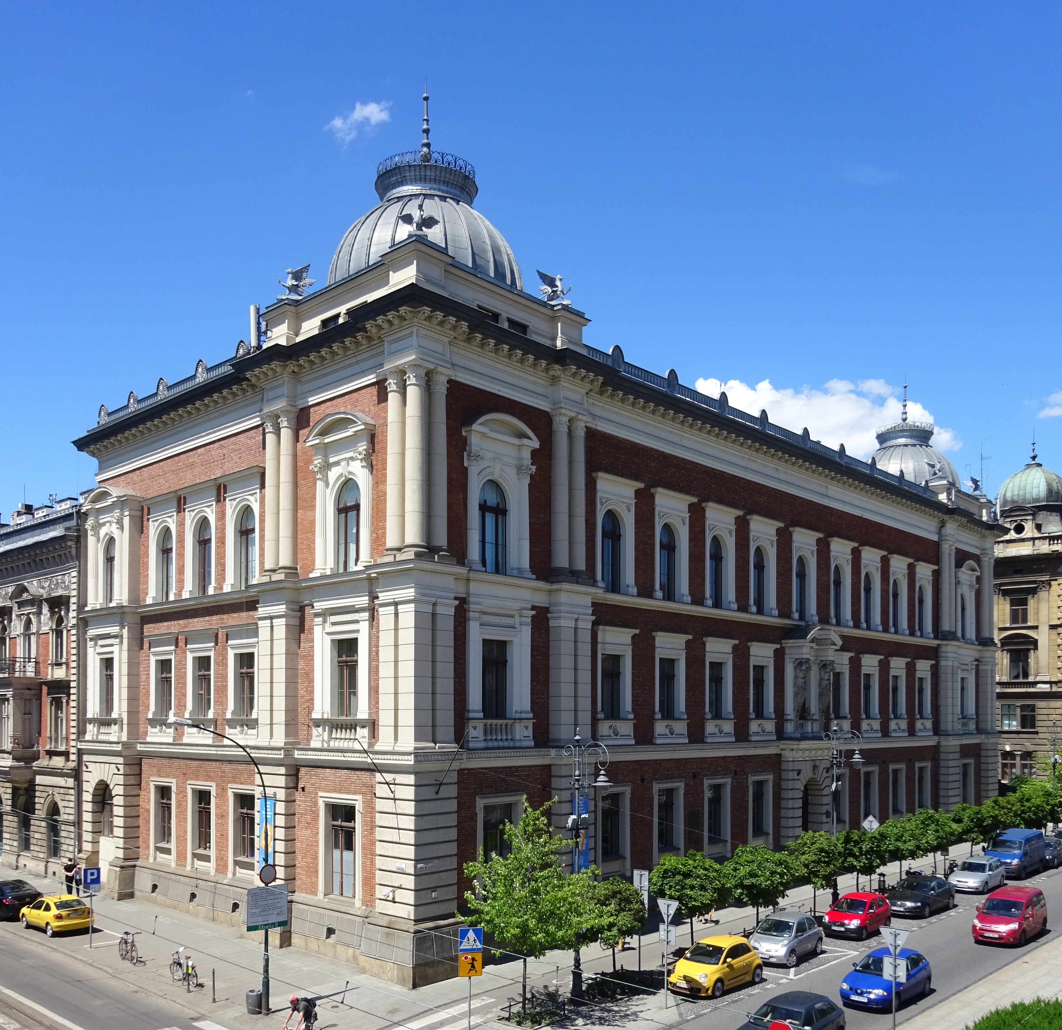 Akademia Sztuk Pięknych im. Jana Matejki w Krakowie. Widok z Barbakanu. Widok po powrocie gryfów, 2016.